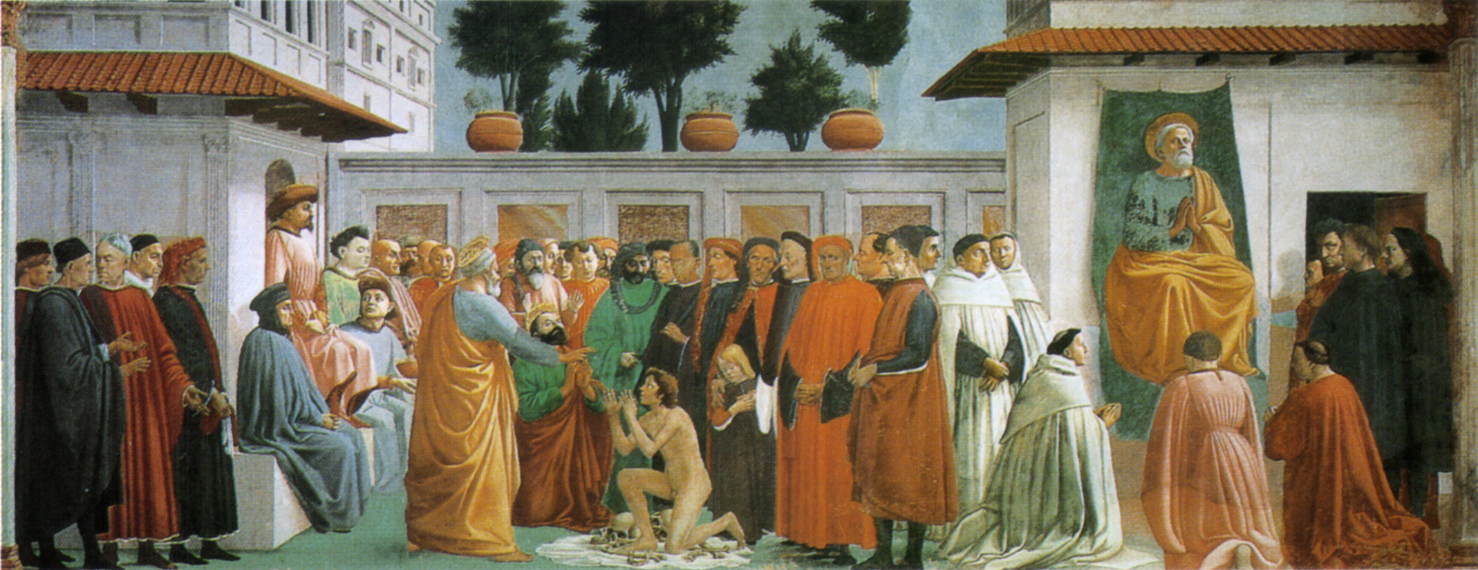 Filippino lippi e masaccio, san pietro in cattedra, cappella brancacci